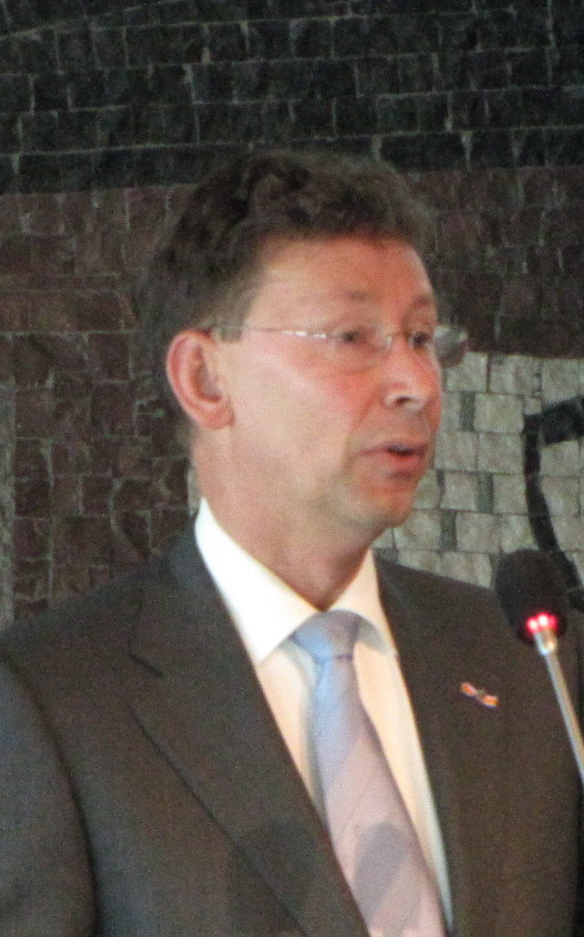 Huis der Provincie. Gelderse Ontmoeting